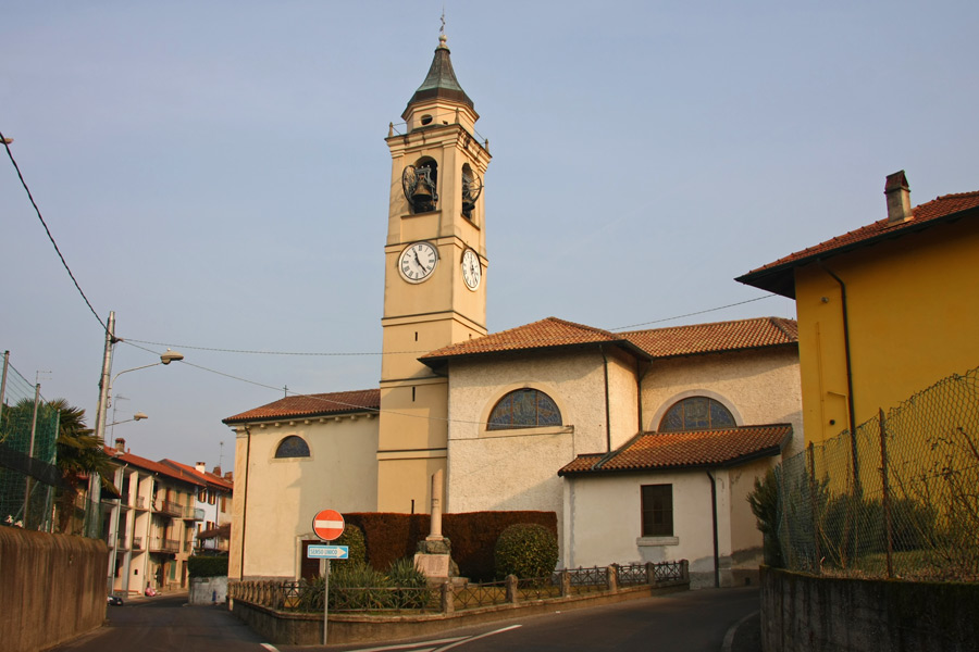 Scorcio dell'abitato di Ranco (VA) con la chiesa parrocchiale di San Martino e Lorenzo.